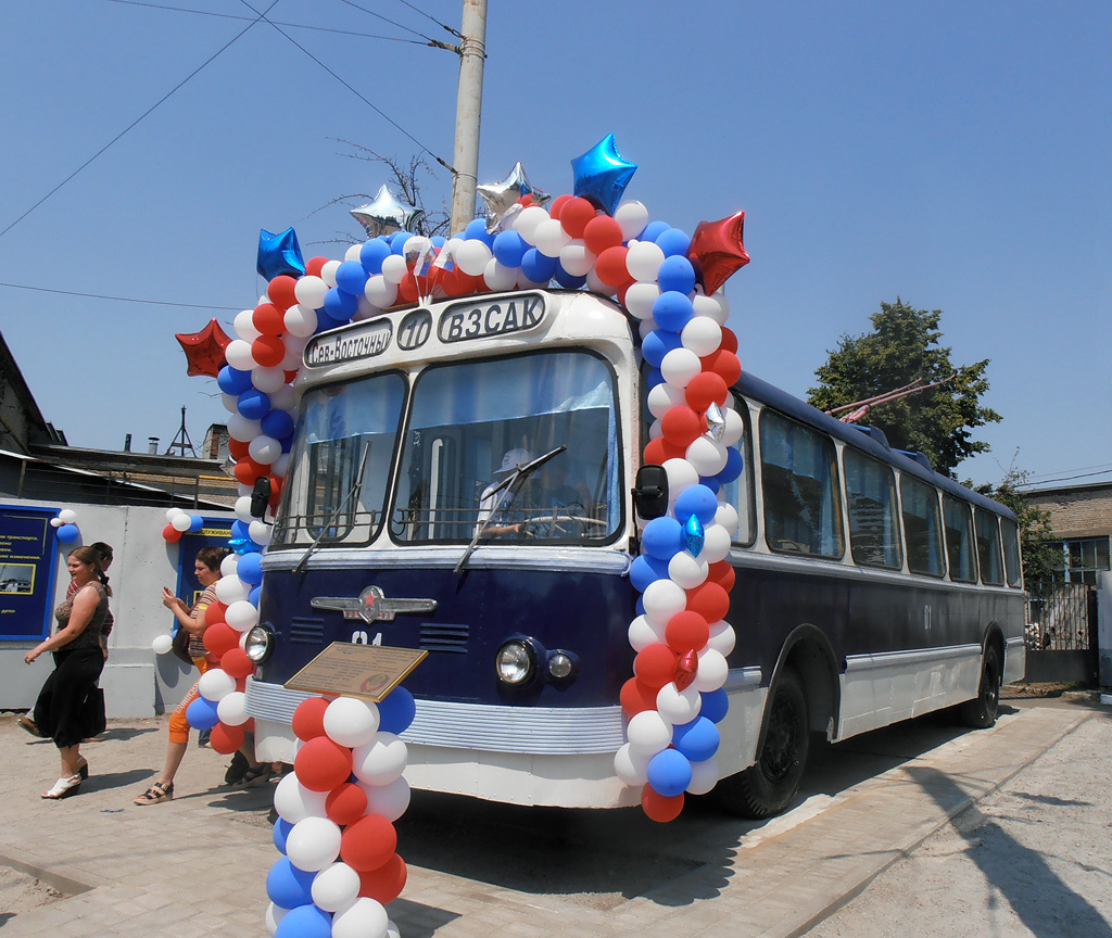 ЗиУ-5